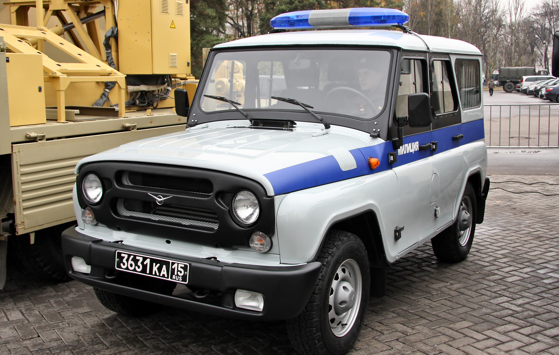 УАЗ-315195 АП (UAZ-315195 AP)